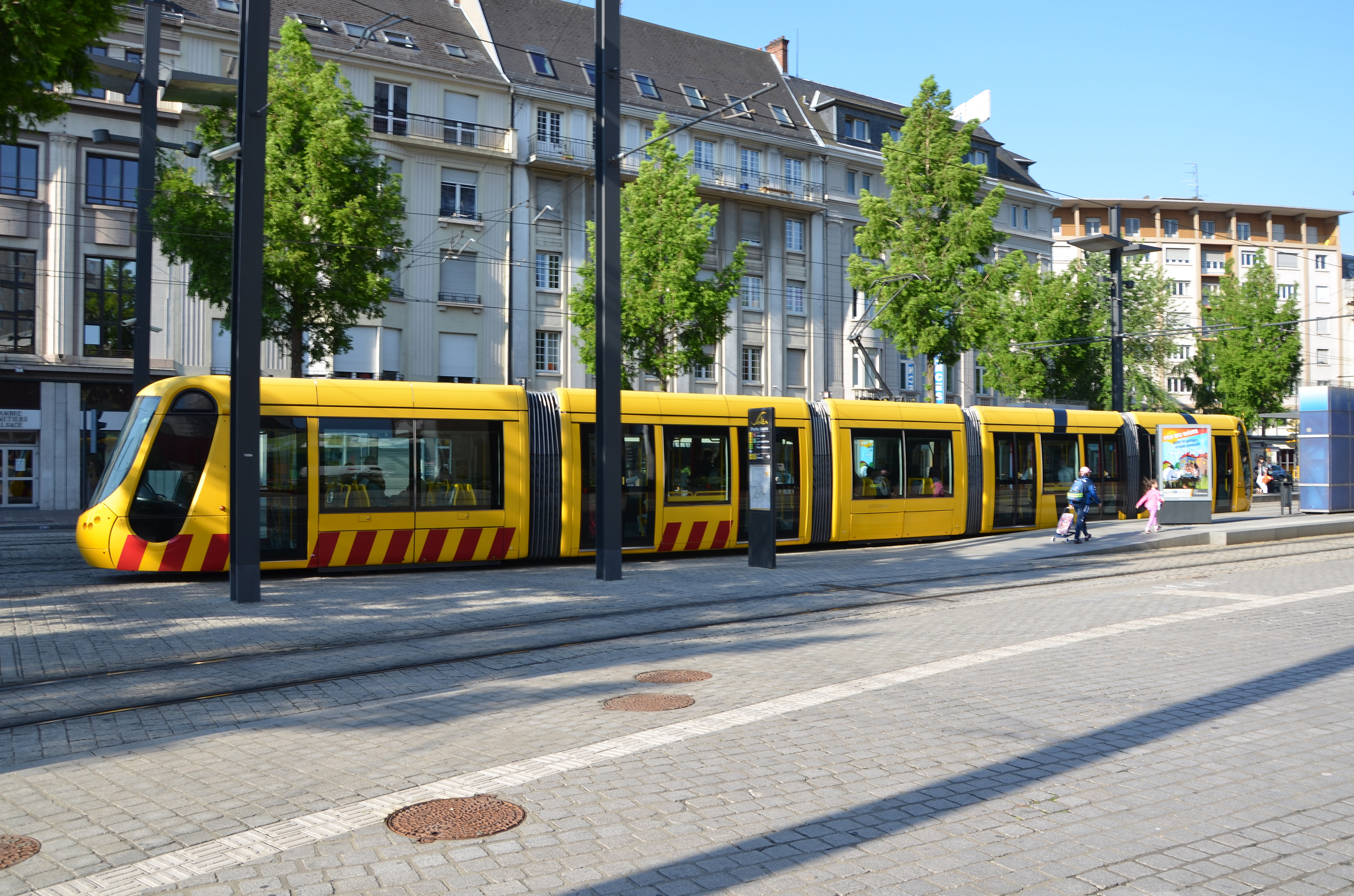 Rame de tramway de Mulhouse Citadis numéro 2012 baptisée « Lutterbach » à la station Porte jeune à Mulhouse, Haut-Rhin, France